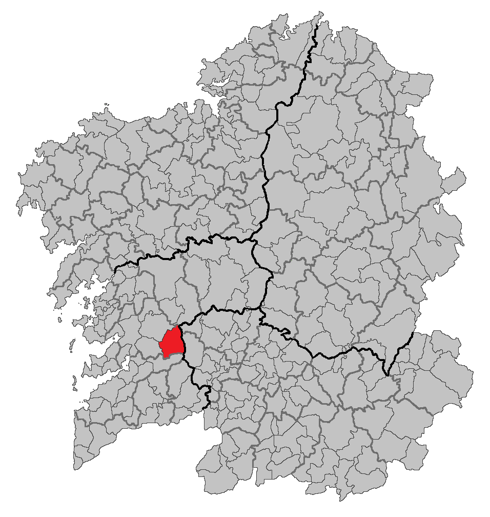 Mapa coa localización do concello de A Lama.